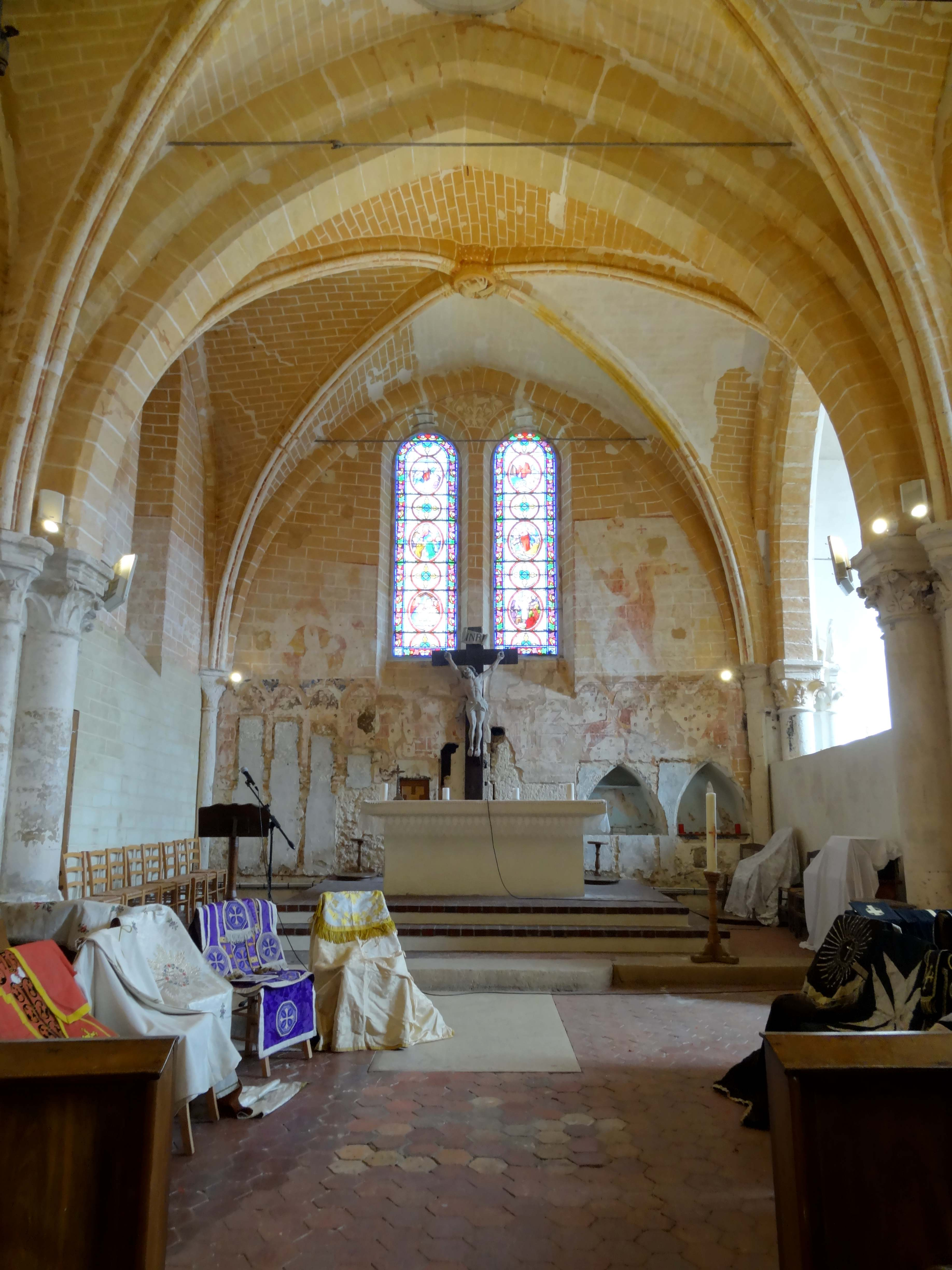 Intérieur de l'église - voir titre.